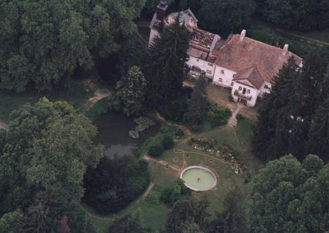 Püspökszentlászló, Hungary, aerialphotography